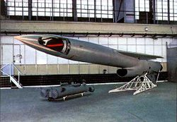 Ракета